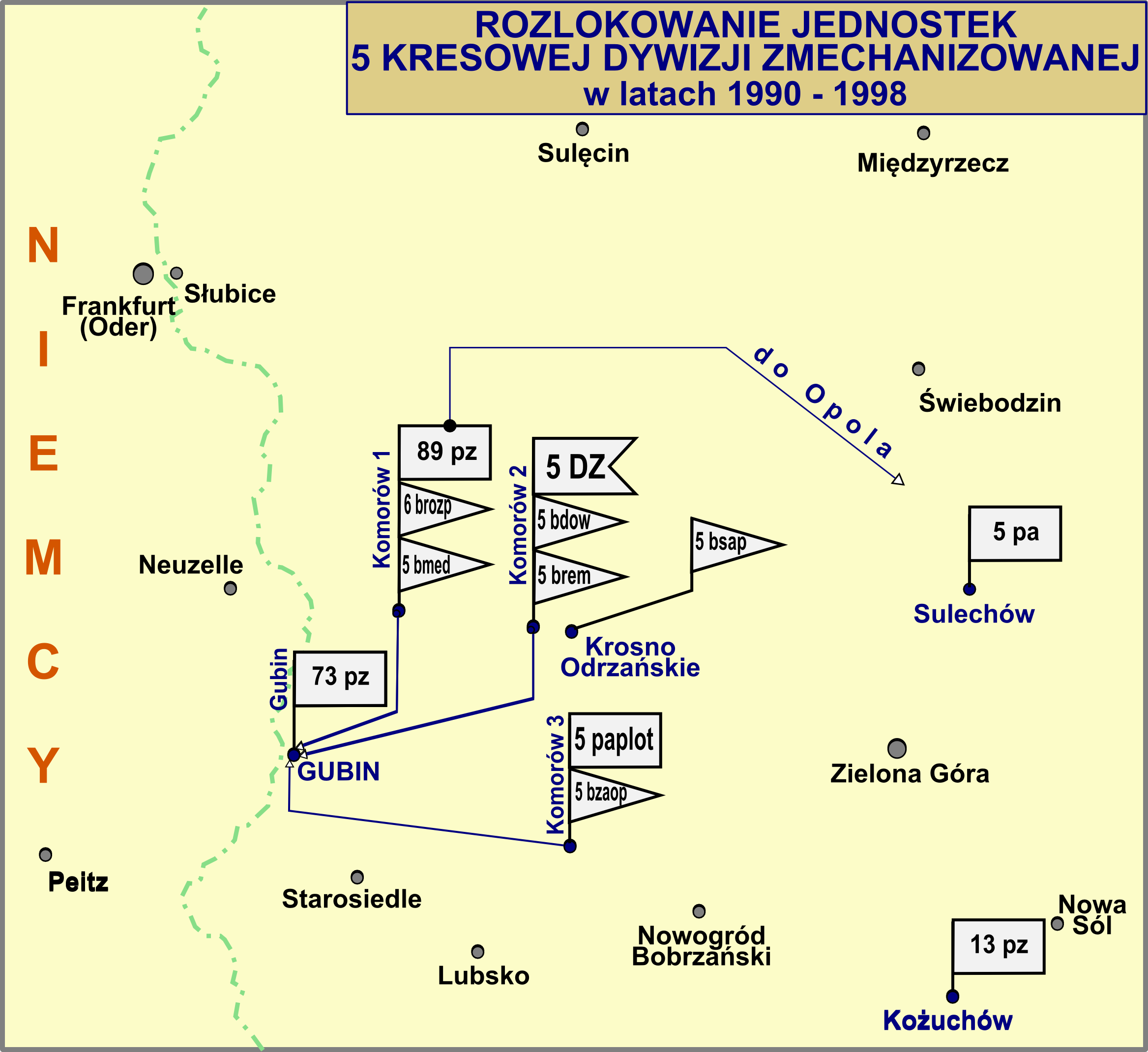 Rozlokowanie jednostek 5 Kresowej Dywizji Zmechanizowanej w latach 1990 - 1998